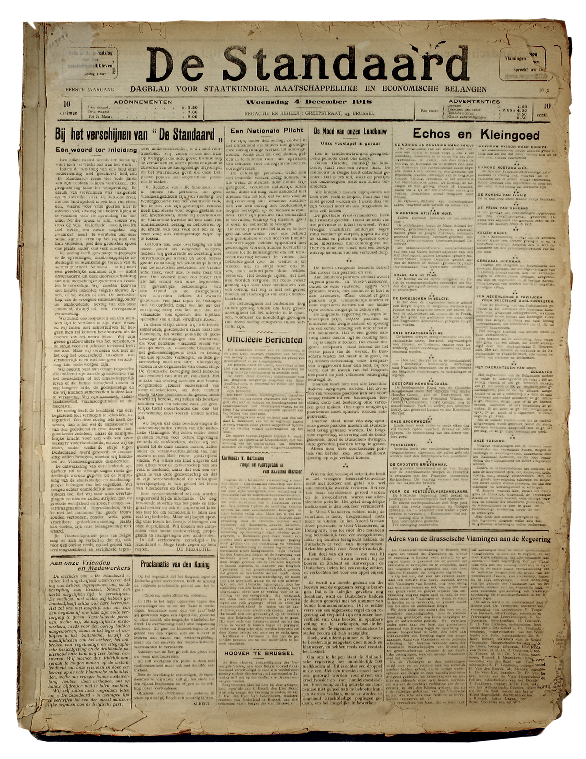 Frontpagina van de eerste editie van de Belgische krant 'De Standaard', 4 december 1918 - Antwerpse stadsbibliotheek.